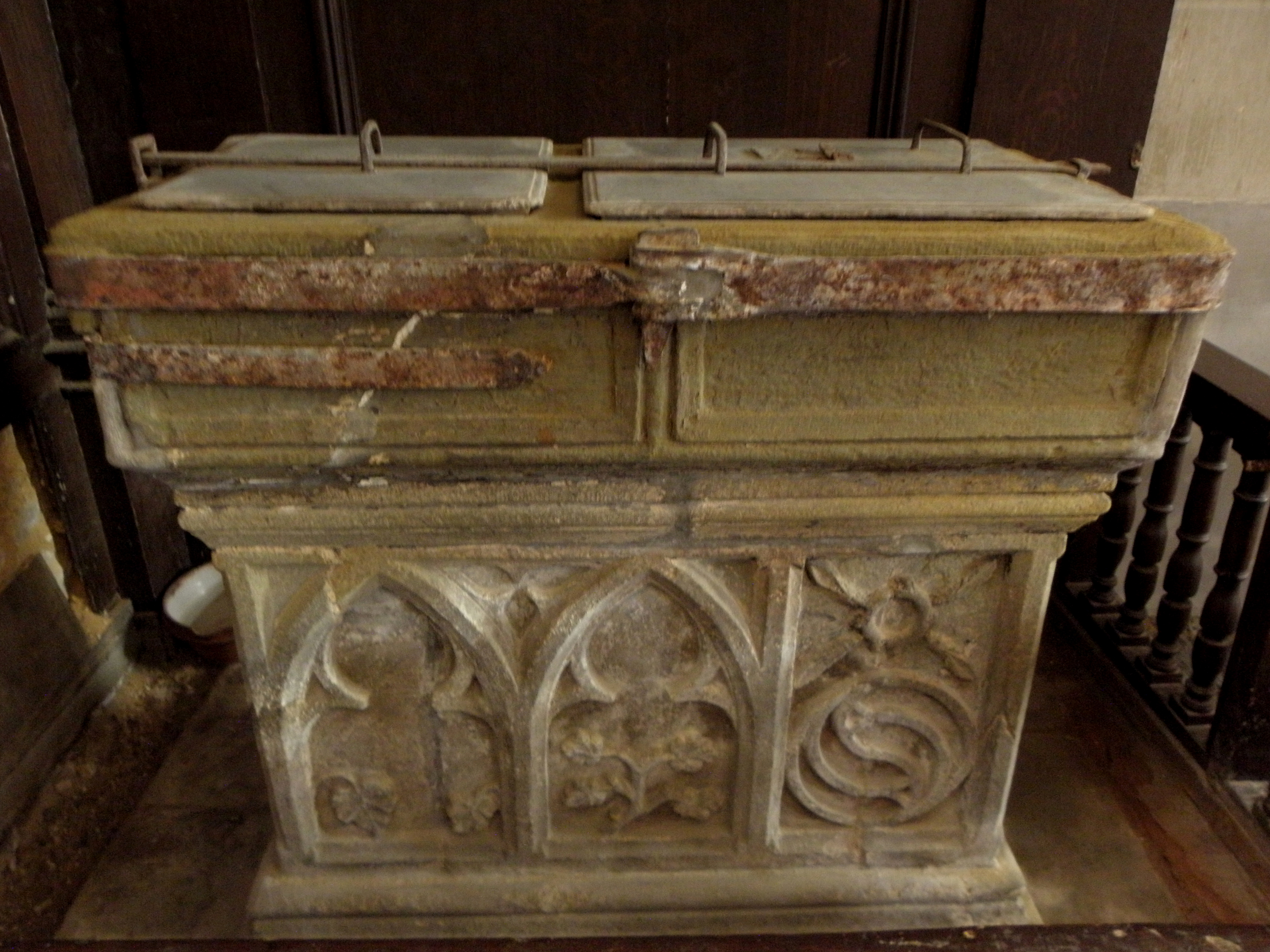 Fonts baptismaux de l'église Saint-Crépin et Saint-Crépinien de Rannée (35).